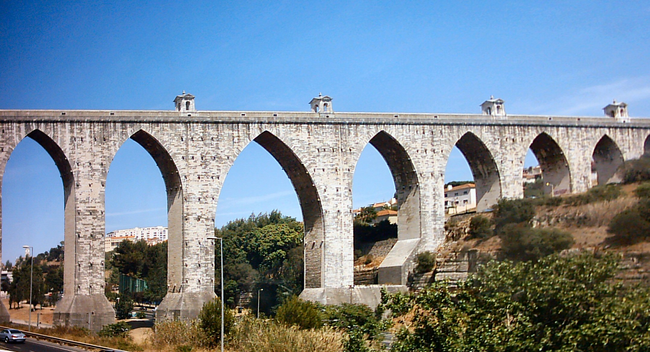 Aqueduto das Águas Livres em Lisboa, Portugal